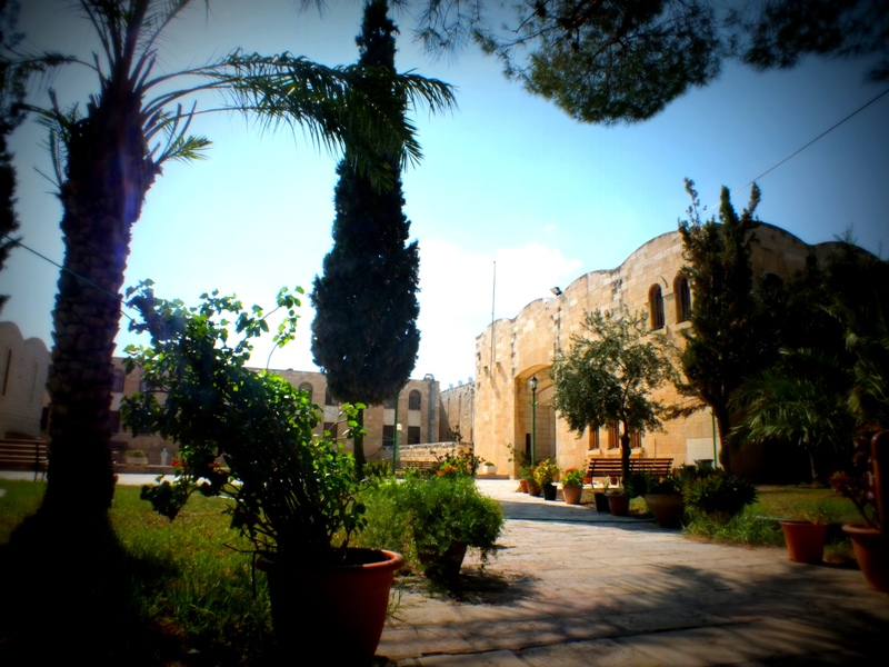 երուսաղեմի ժառանգավորաց վարժարան